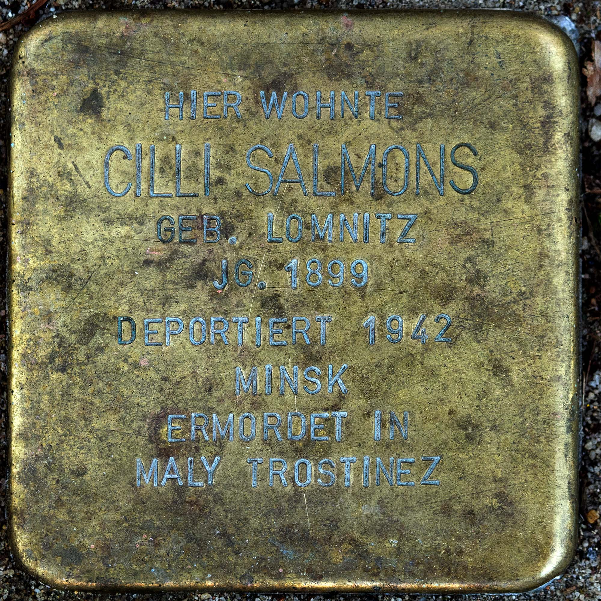 Stolperstein für Salmons, Cilli